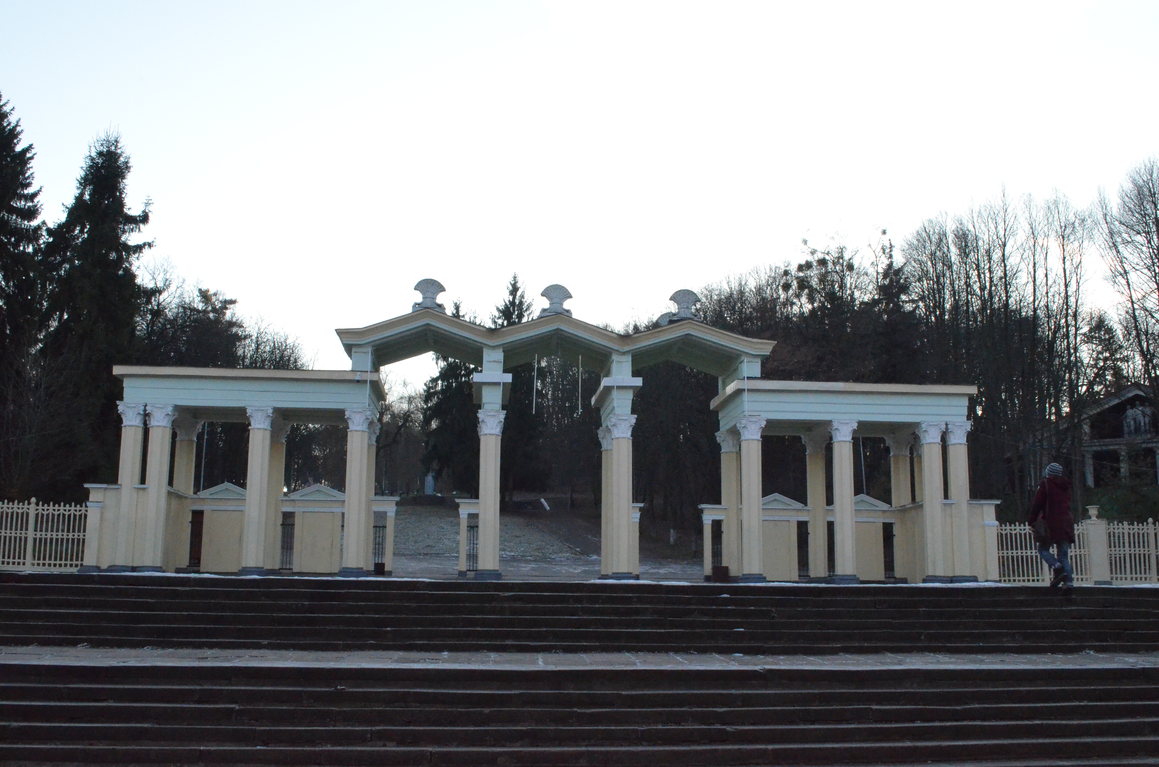 Парк культури та відпочинку імені Богдана Хмельницького, м. Львів